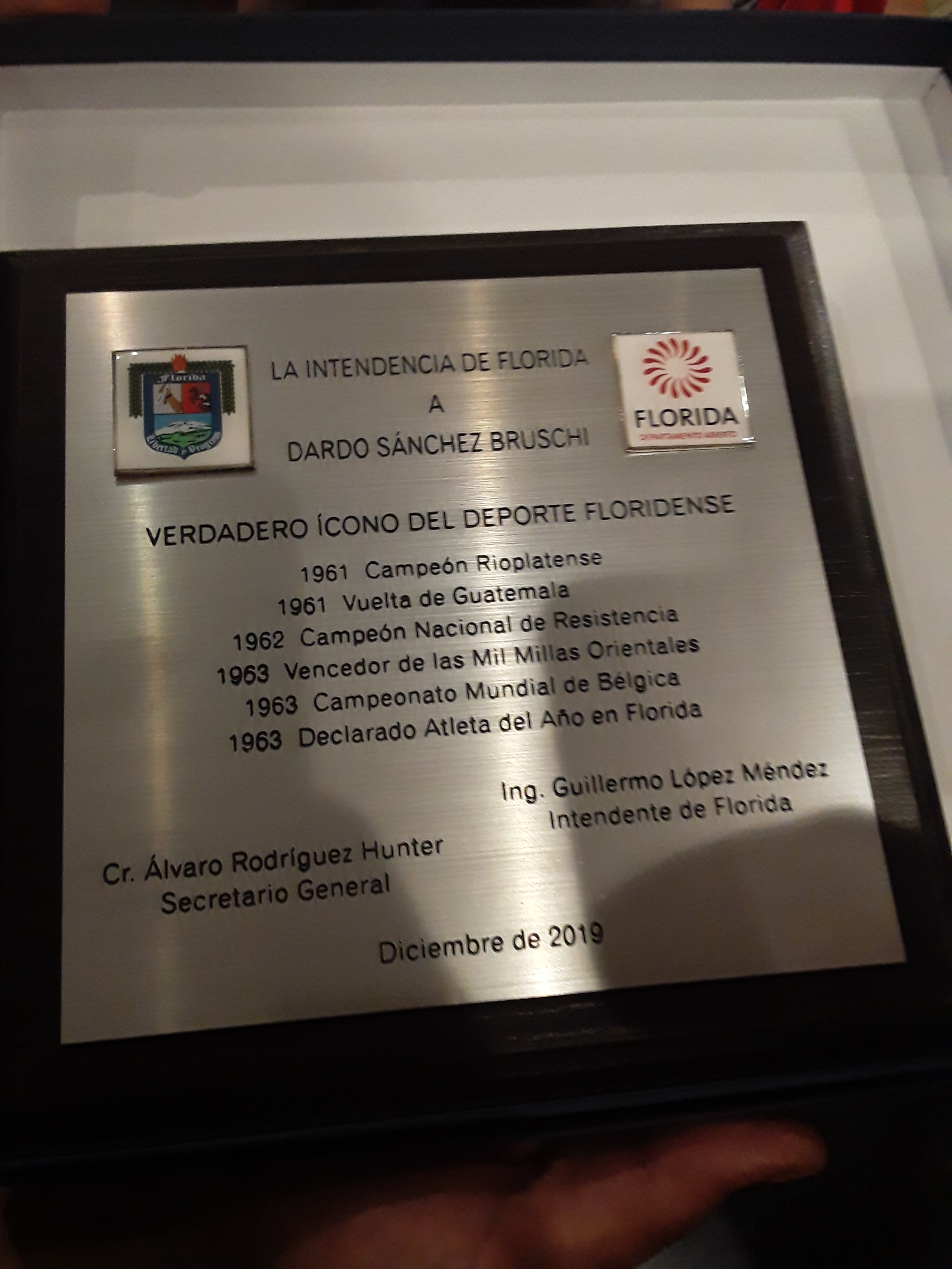 Reconocimiento otorgado a Dardo Danchez en diciembre de 2019 por parte de la intendencia